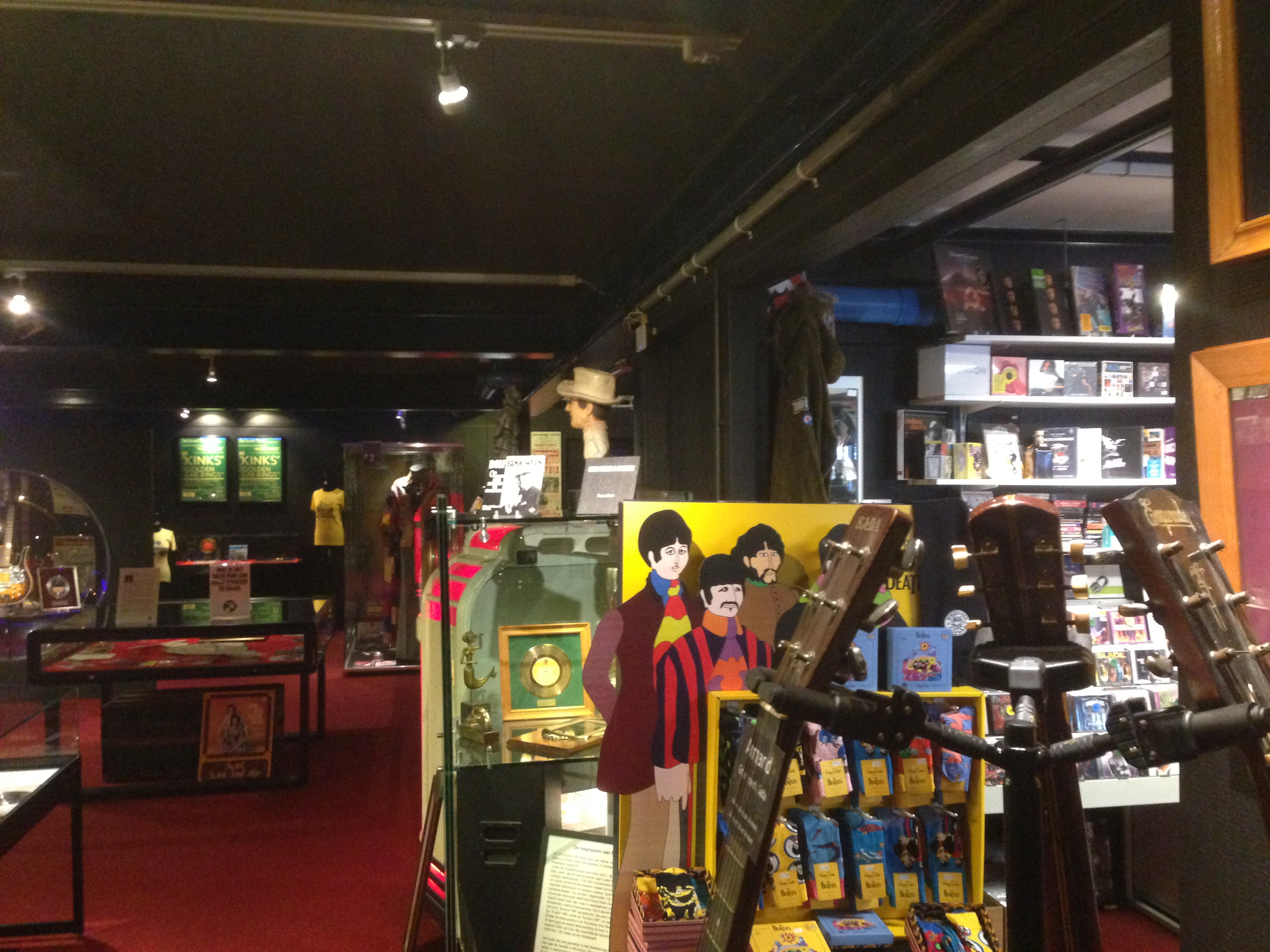 Museum RockArt, Hoek van Holland, Netherlands